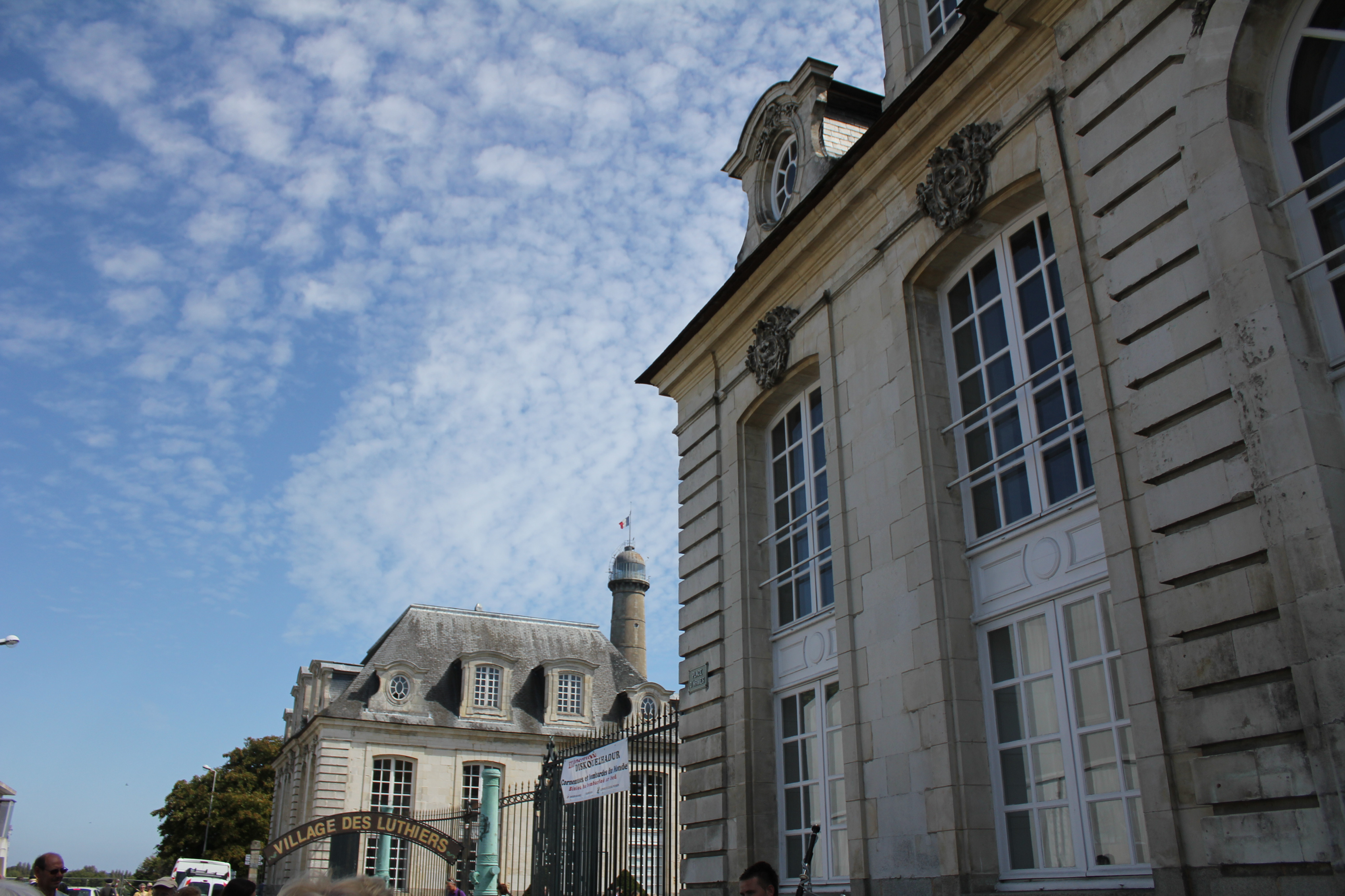 Hotel Gabriel construit par la compagnie des Indes à Lorient